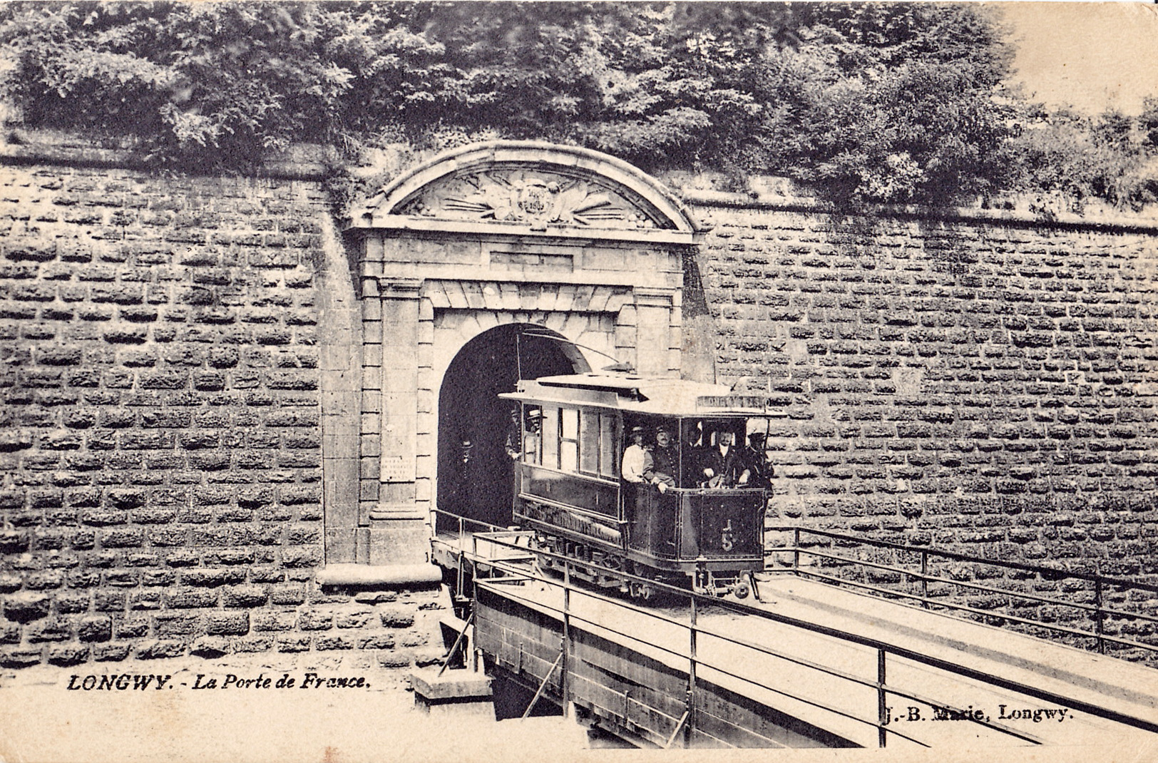 Carte postale ancienne éditée par J.-B. Marie à Longwy : LONGWY - La Porte de France